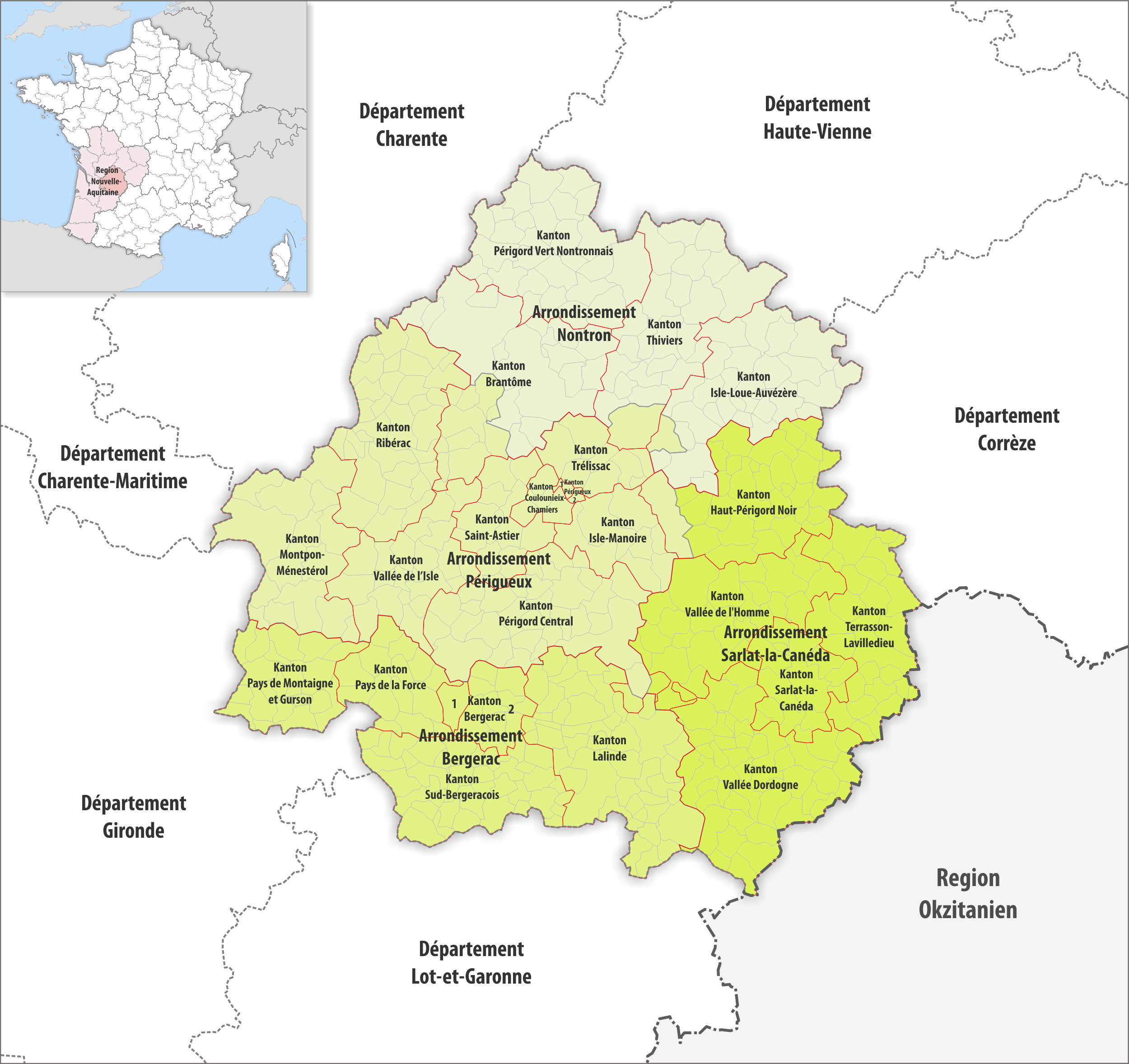 Gemeinden, Kantone und Arrondissemente im Departement Dordogne